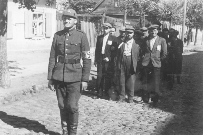 Wilna, Juden, litauischer Polizist An der Sowjetfront. (Litauen) Litauischer Soldat mit einem Trupp Juden abmarschbereit zur angewiesenen Arbeitsstelle. Alle Juden tragen auf Brust und Rücken ein "J" auf weissem Grund als Kennzeichen ihrer Rassezugehörigkeit. (Wilna) PK-Aufnahme: Kriegsberichter: Schmidt-Schaumburg Juli 1941 7222-41 [Litauen, Wilna.- litauischer Soldat mit Hakenkreuzbinde vor einer Gruppe von Juden]